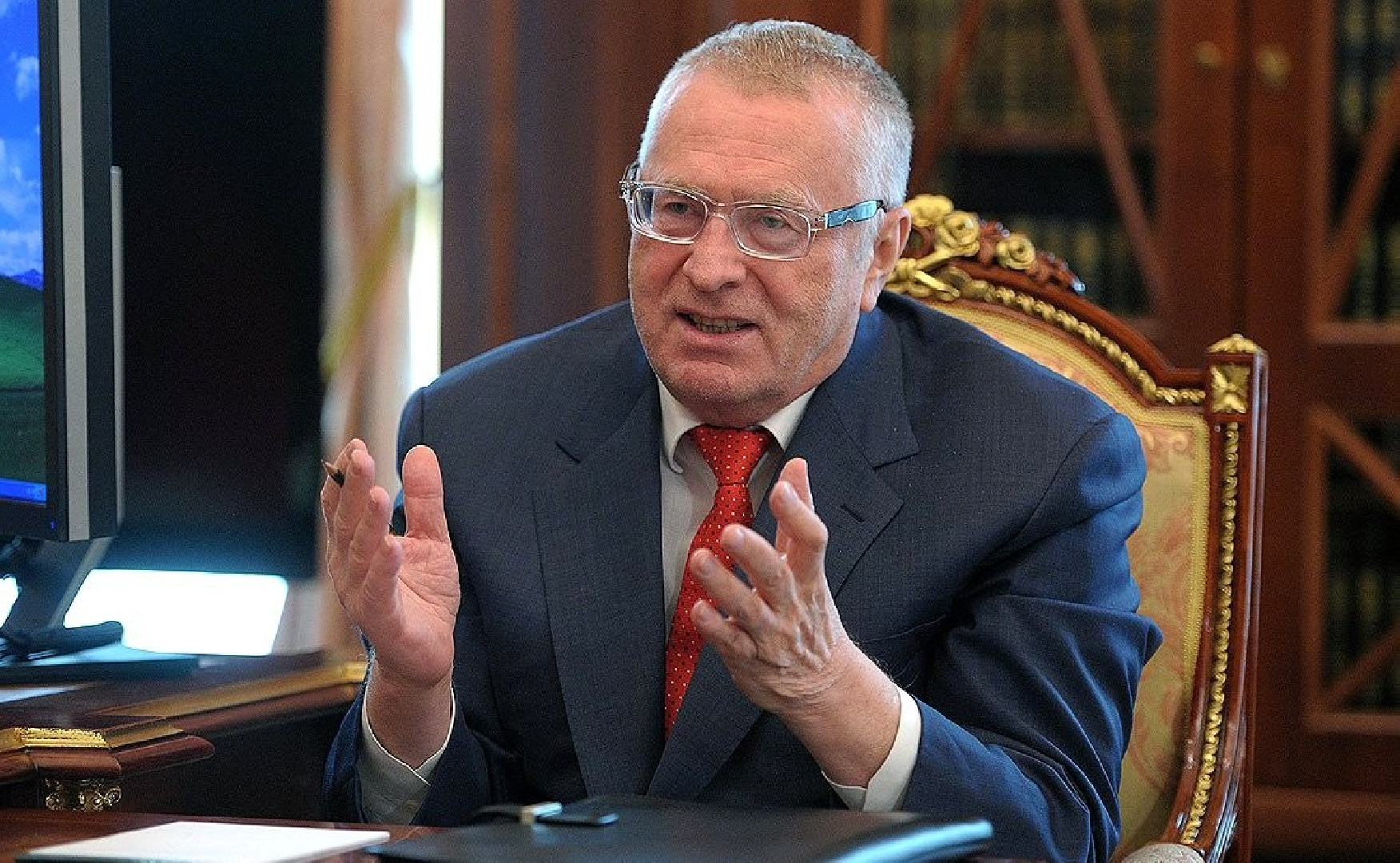 Председатель партии ЛДПР Владимир Вольфович Жириновский